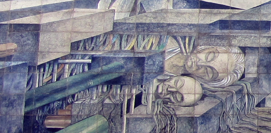 Detalle de la obra "Homenaje de la ciudad de Santiago a Gabriela Mistral", tomado de la imagen: File:Stgo 136-A.jpg de Rodrigo Fernández, 2013